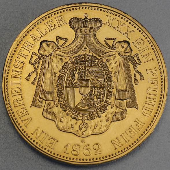 Liechtenstein vereinsthaler